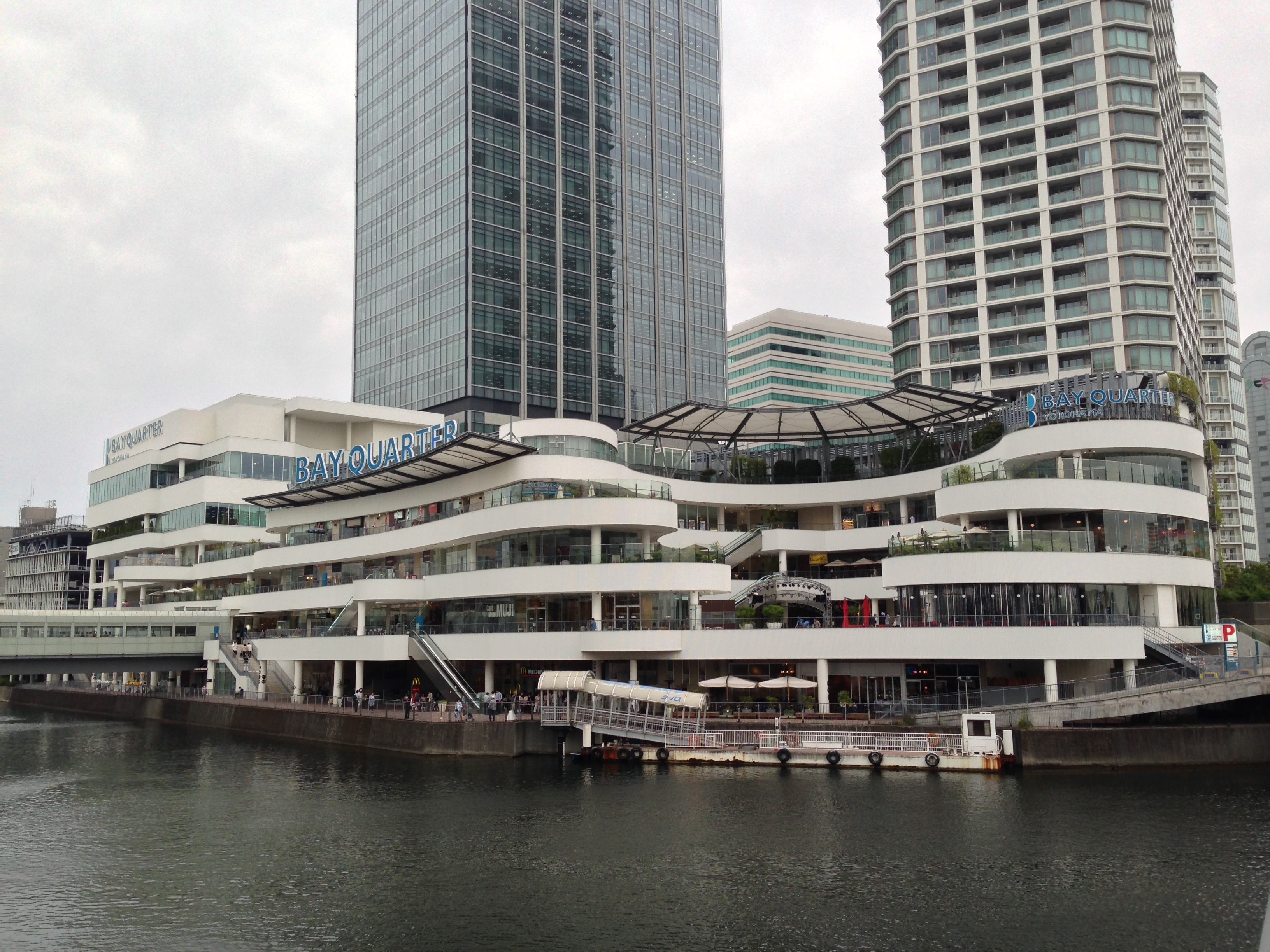 横浜駅東口の商業施設「横浜ベイクォーター」。ポートサイド地区の入り口にもあたる。